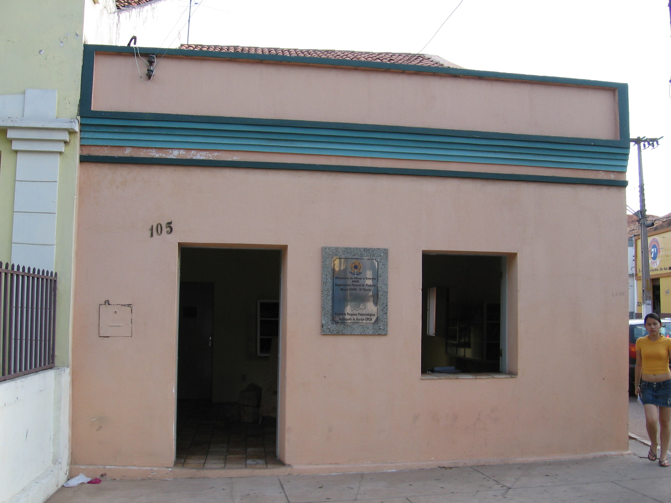 Museu dos Fósseis do Crato, na Praça da Sé. Seu nome oficial é Centro de Pesquisas Paleontológicas da Chapada do Araripe (CPCA), vinculado ao Departamento Nacional de Pesquisa Mineral do Ministério de Minas e Energia.